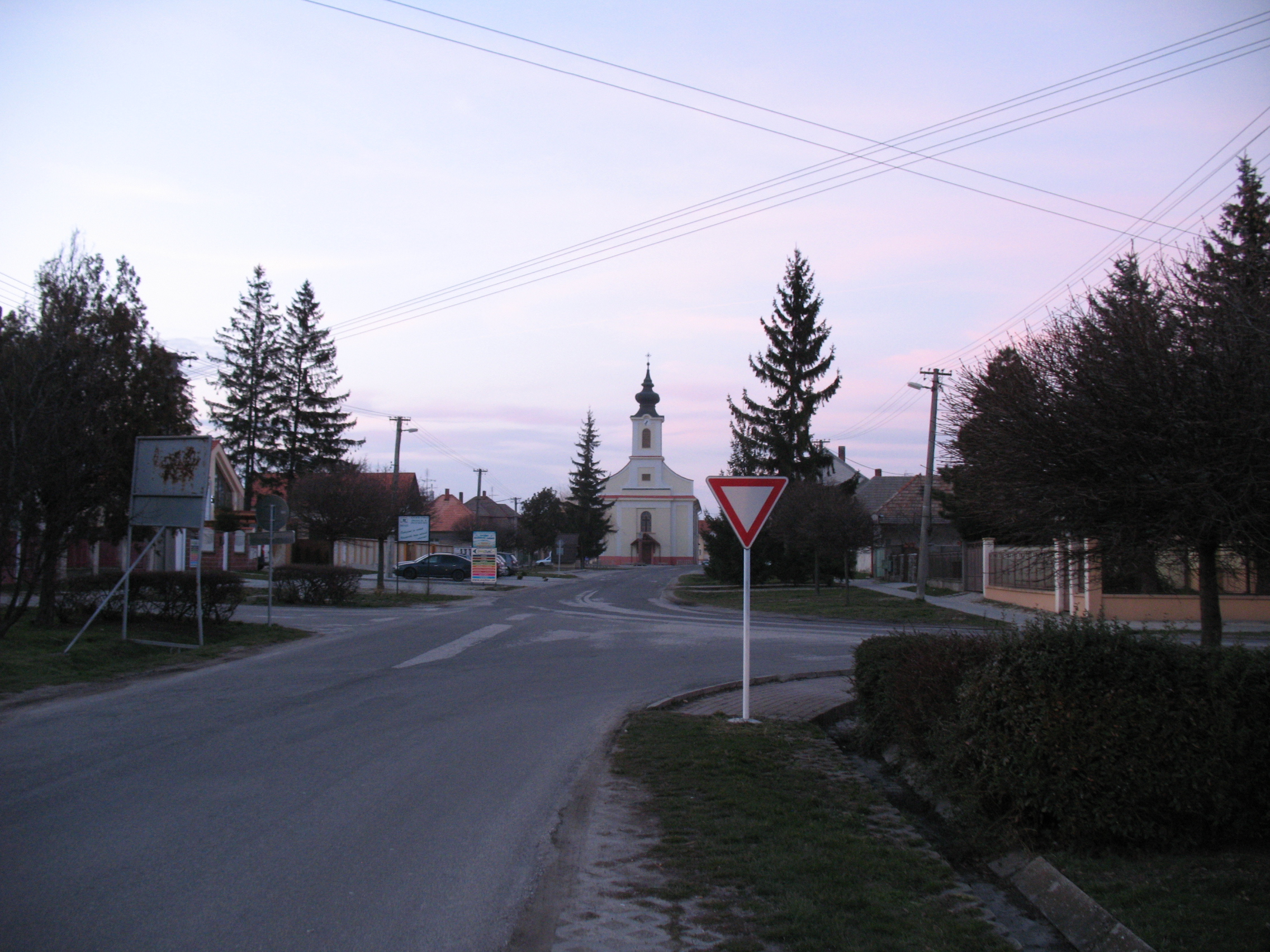 Pered